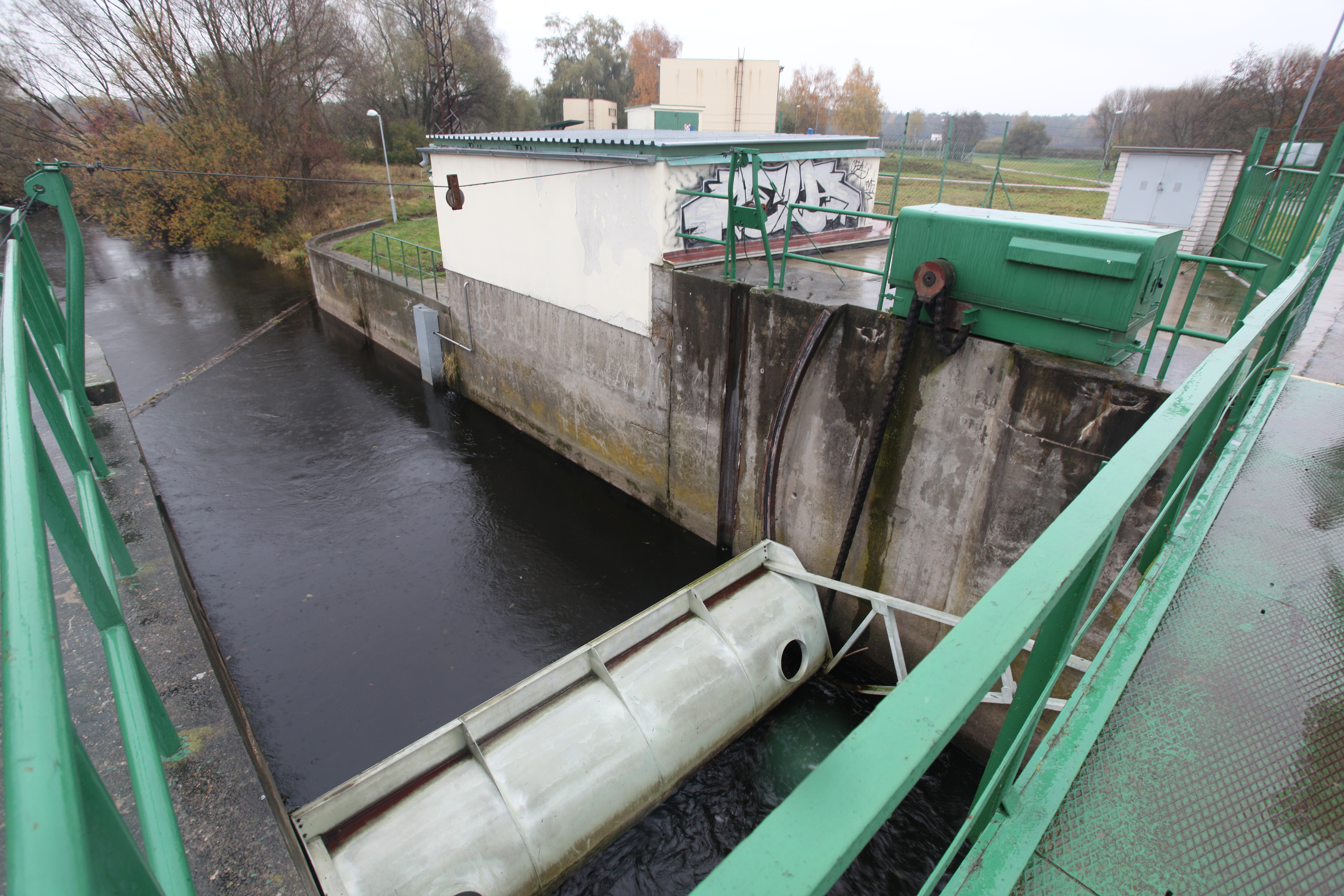 Odběrné místo surové vody z řeky Jizery na dolním toku nedaleko Káraného. Voda je načerpávána do čerpací stanice a poté potrubím dopravována do úpravny vod s pískovými rychlofiltry. Odtud teče do vsakovací nádrže, kde se přes pískové podloží vsakuje do půdy. Na obrázku je vidět pohyblivý segment, sloužící k regulaci hladiny říční vody u odběrného místa. Zdroje: Křivánek, Oldřich a Kněžek, Miroslav. 2001. Zdroje pitné vody v Káraném. Principy získávání vody v oblasti káranské vodárny. Pražské vodovody a kanalizace a.s.